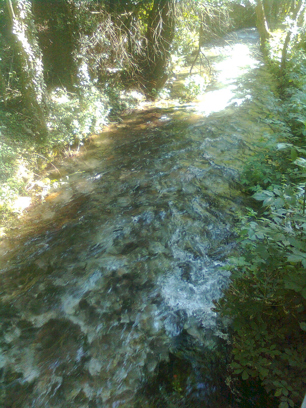 Torrente Ussita a Visso (PG), poco prima della confluenza col Nera